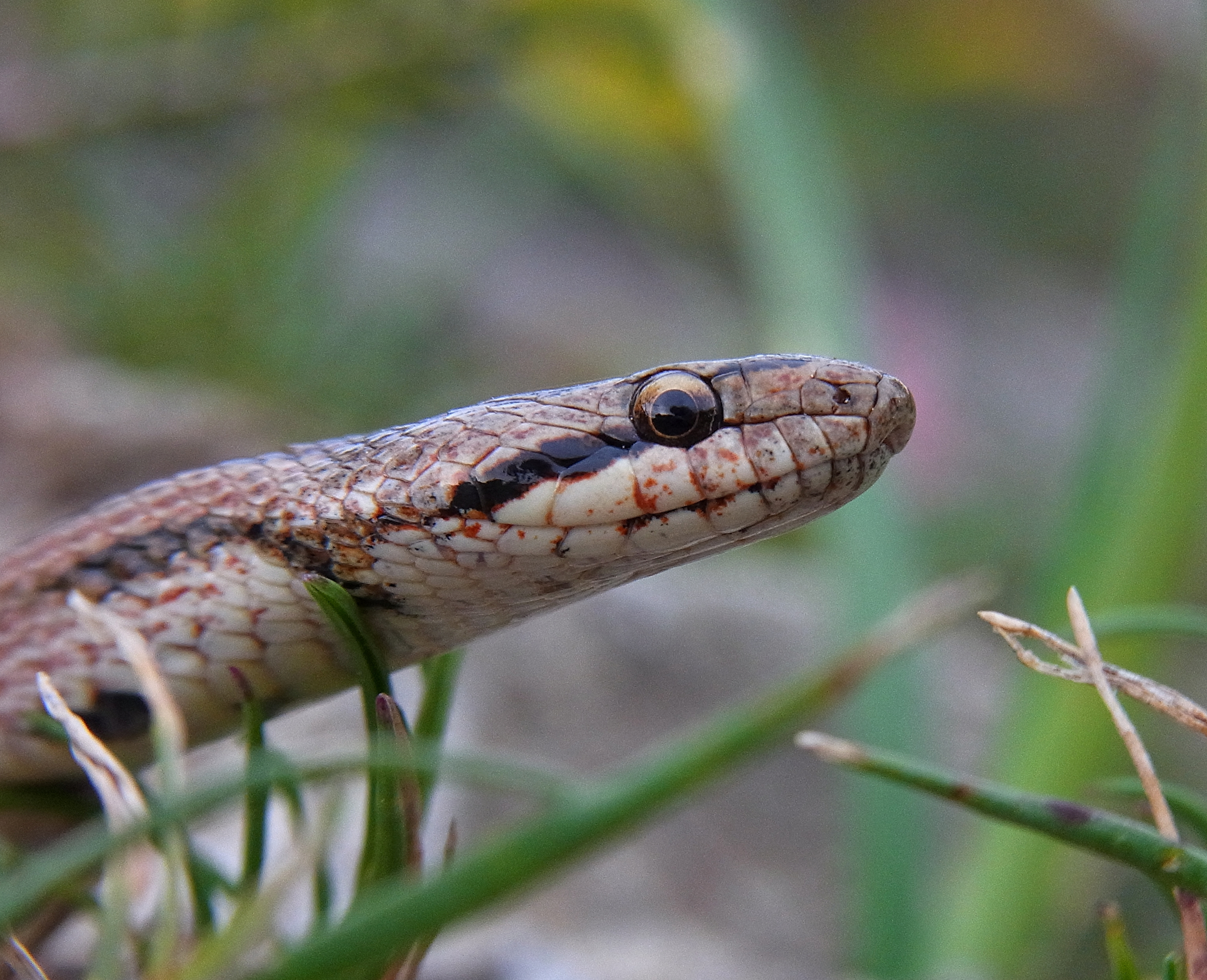 Coronella girondica aus Nordspanien bei Ansó (östlich Pamplona) am 18.5.2011